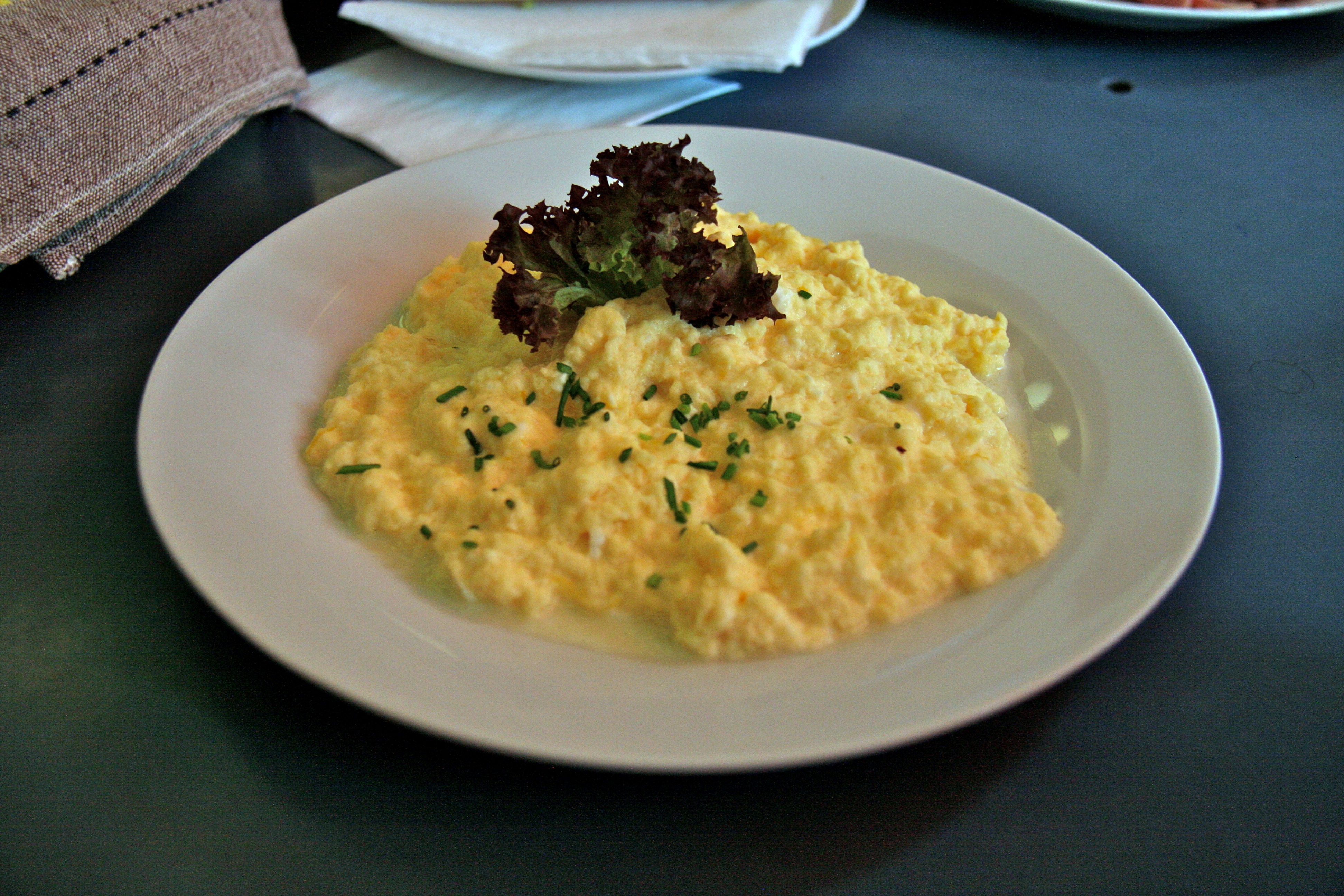 Huevo revuelto con queso parmesano